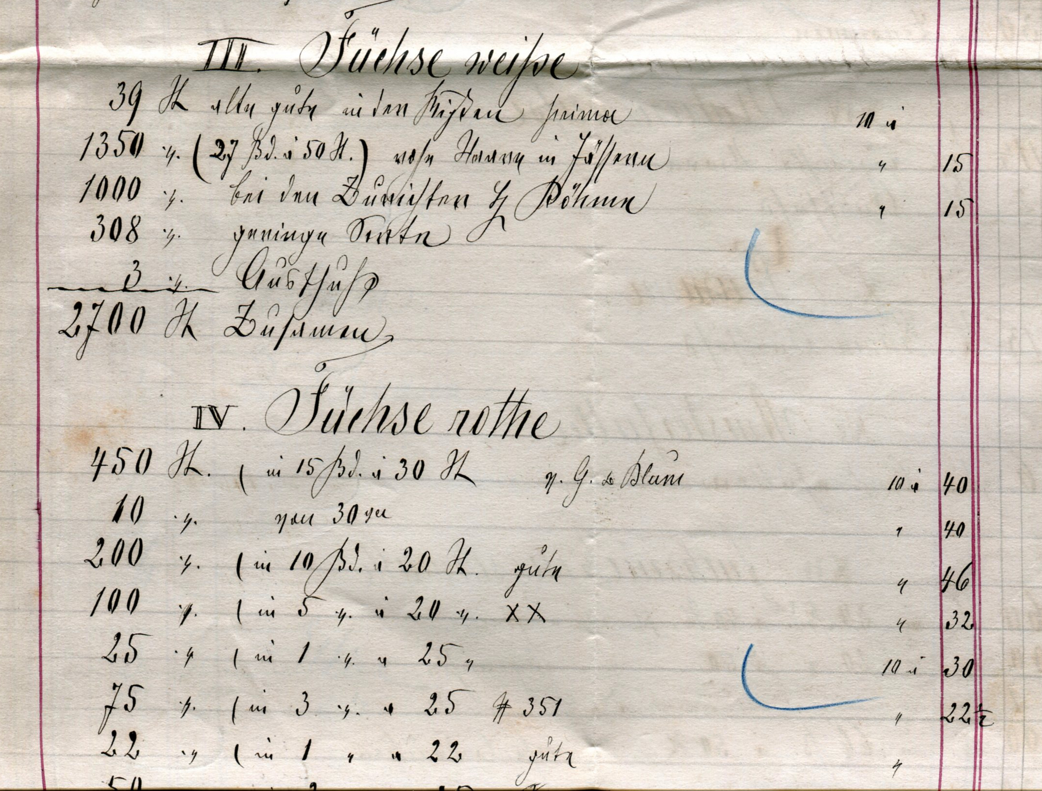 Waaren-Bestand (Bildausschnitt: Füchse)